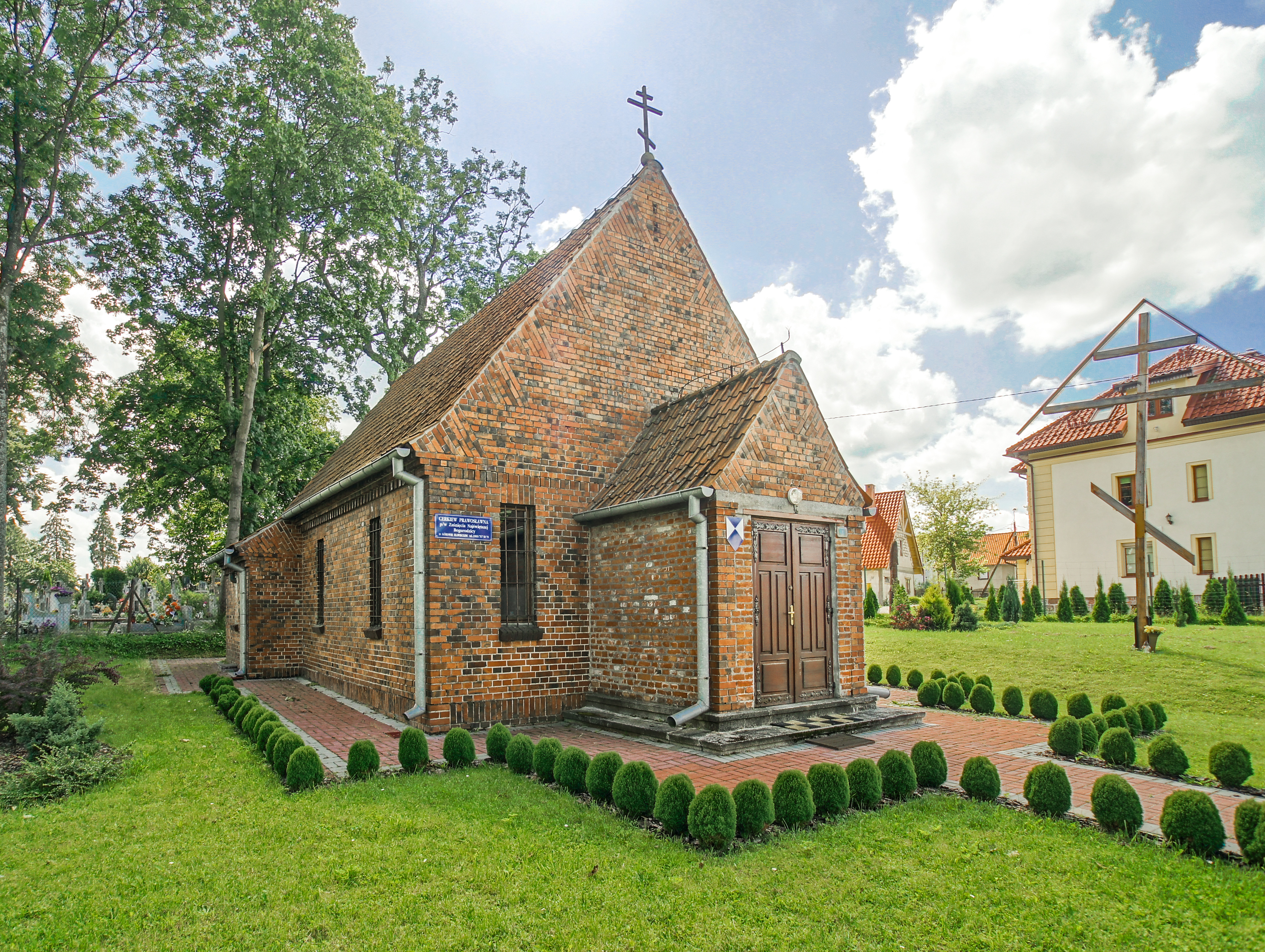 Dawna kaplica ewangelicka, obecnie cerkiew prawosławna pw. Zaśnięcia Matki Boskiej w Górowie Iławeckim. Zdjęcie HDR.